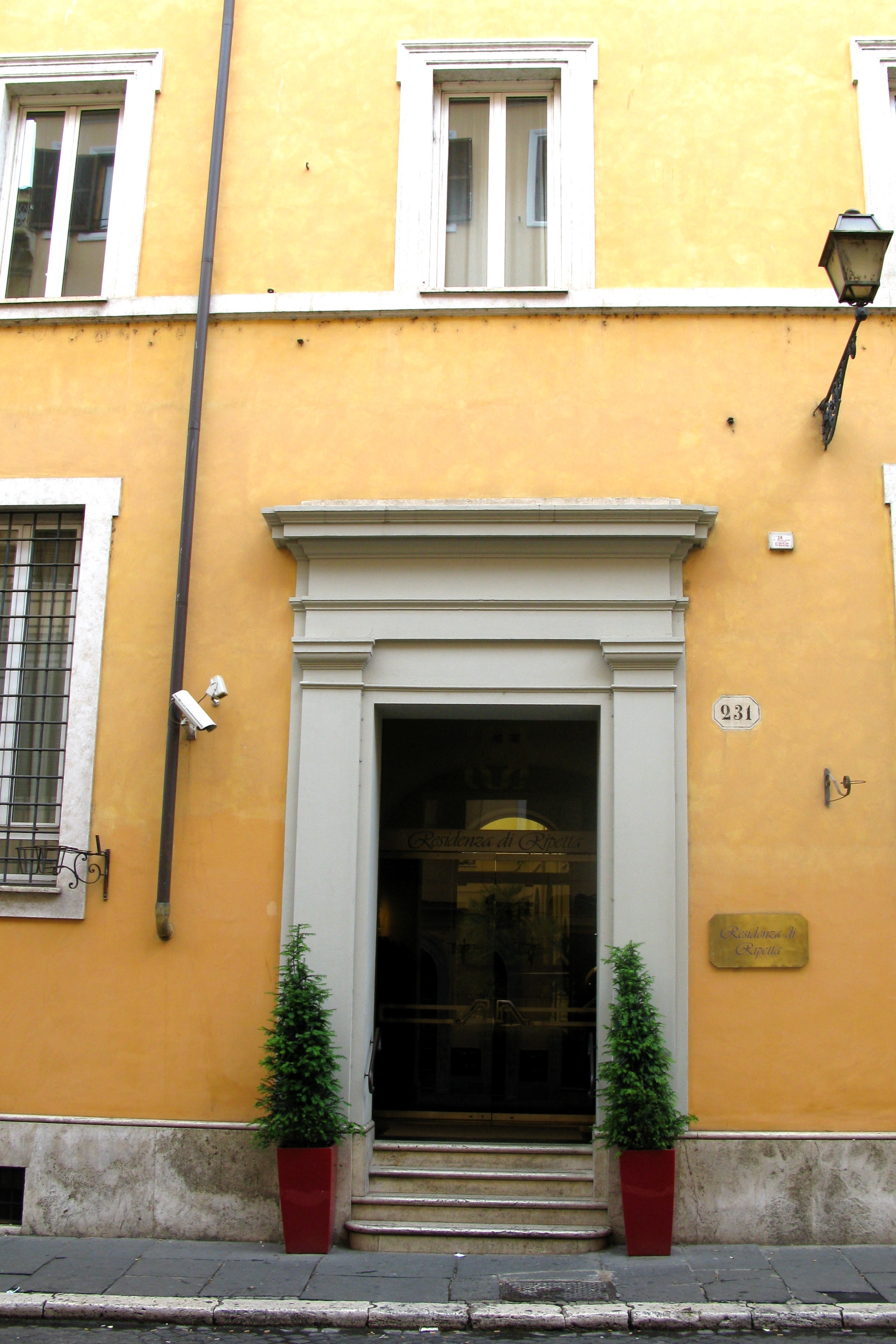 Entrata della Residenza di Ripetta, ex Conservatorio della Divina Provvidenza e di San Pasquale (XVII secolo), in via di Ripetta 231, a Roma, nel rione Campo Marzio.